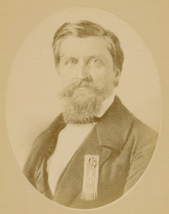 Georges-Charles d'Anthès, baron de Heeckeren